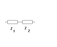 Deux impédances en série